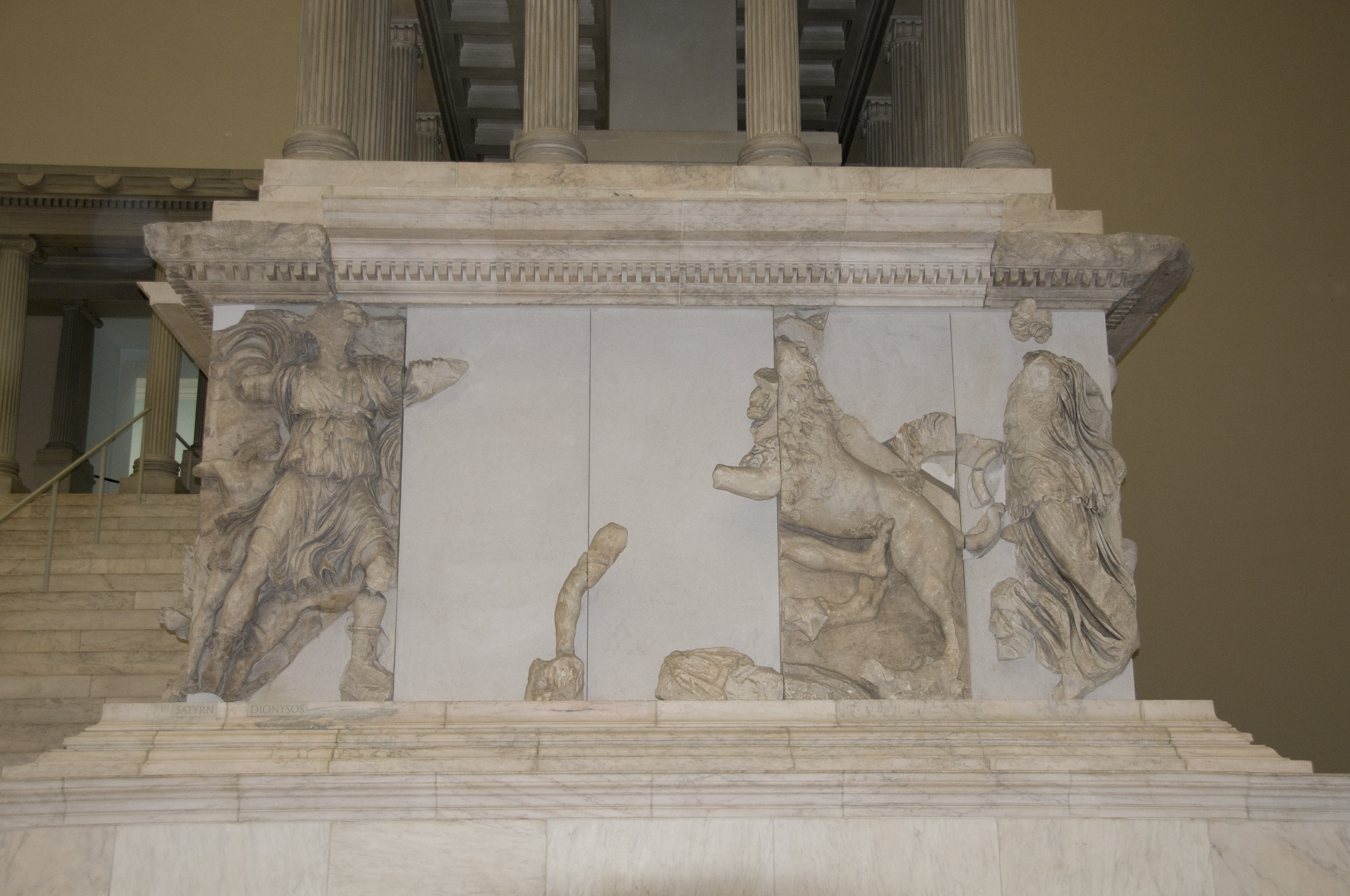 Altar van Zeus in het Pergamonmuseum, Berlijn